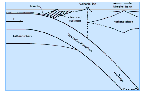 zona subduksi, dimana lempeng dengan densitas lebih besar menunjam lempeng lainnya